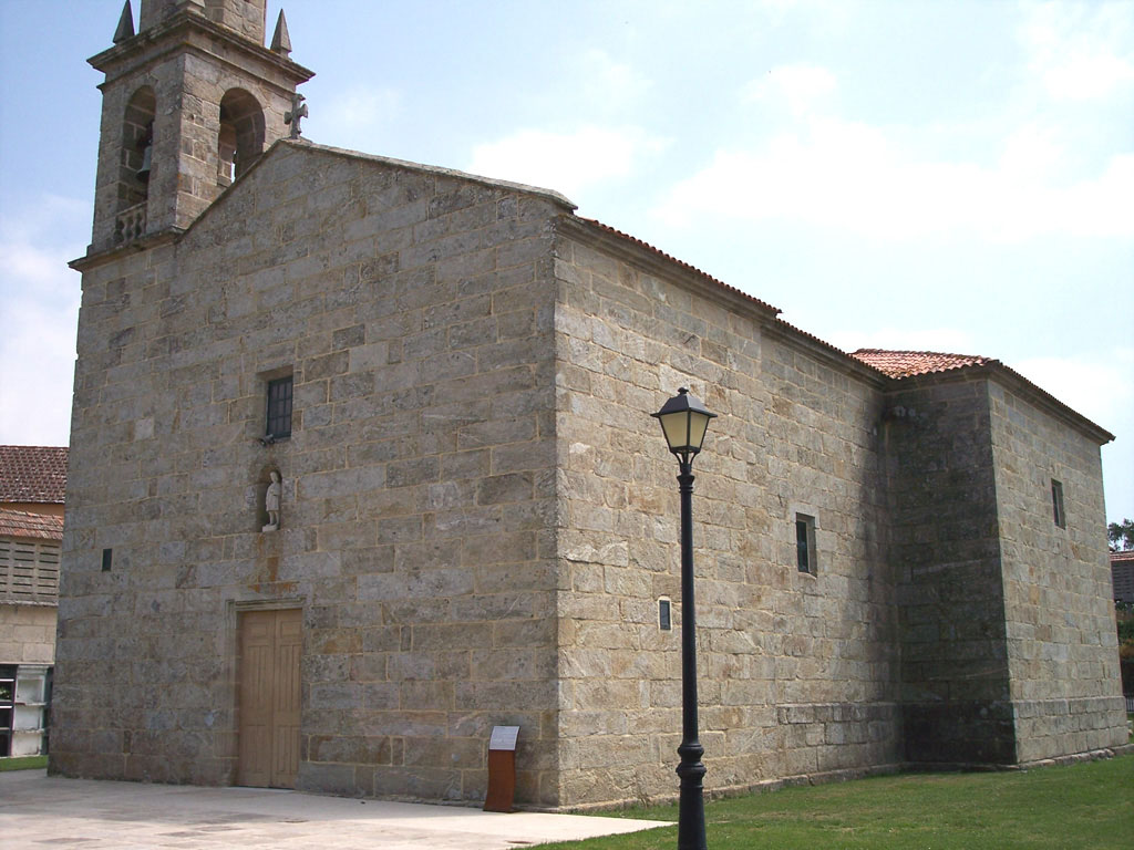 Igrexa parroquial de San Paio de Carreira